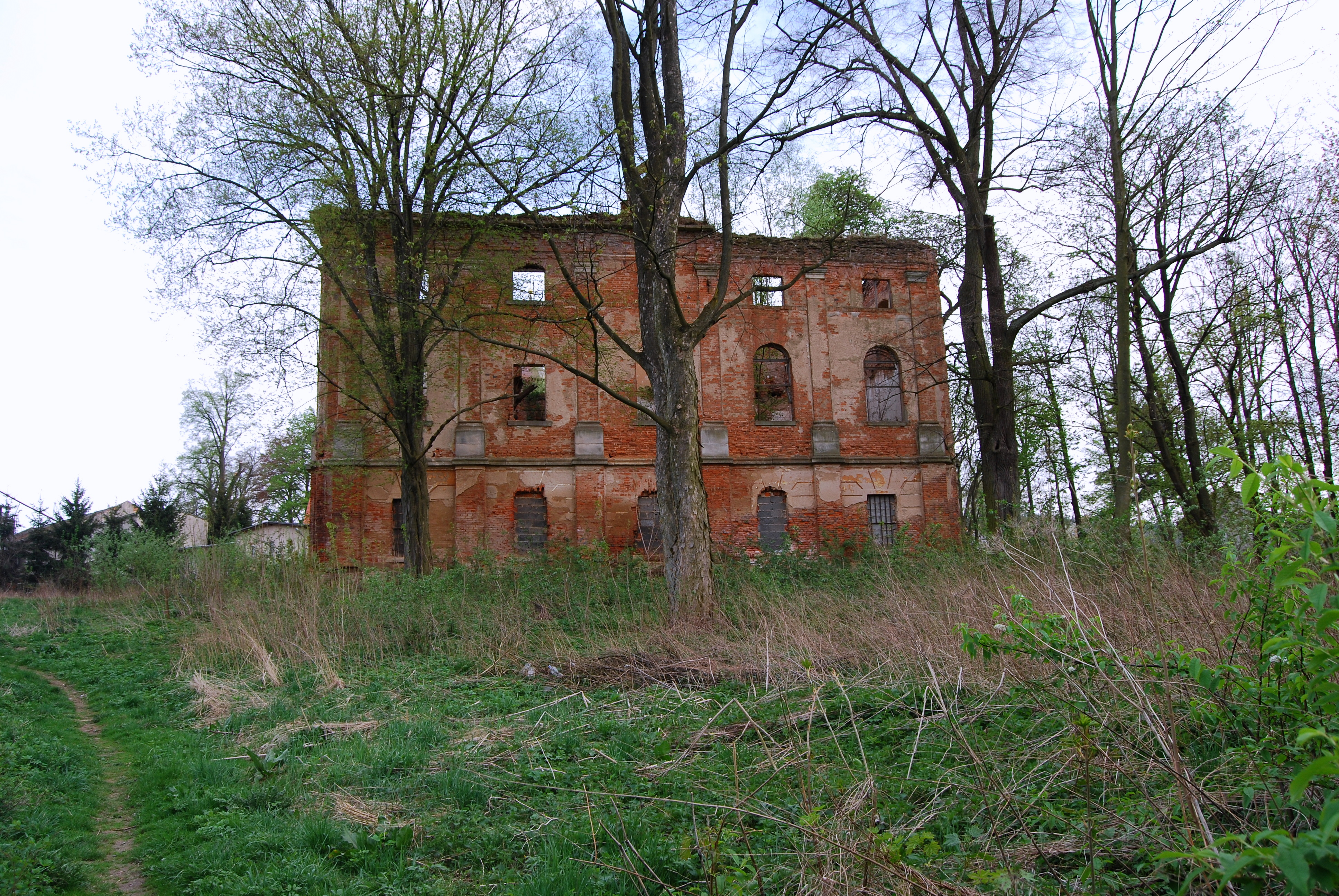 Pałac (ruina), 1734, Rząśnik, pow. złotoryjski